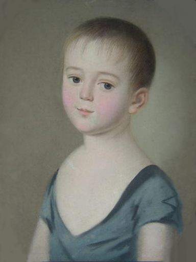 Портрет Фёдора Тютчева. Акварель на фарфоре.